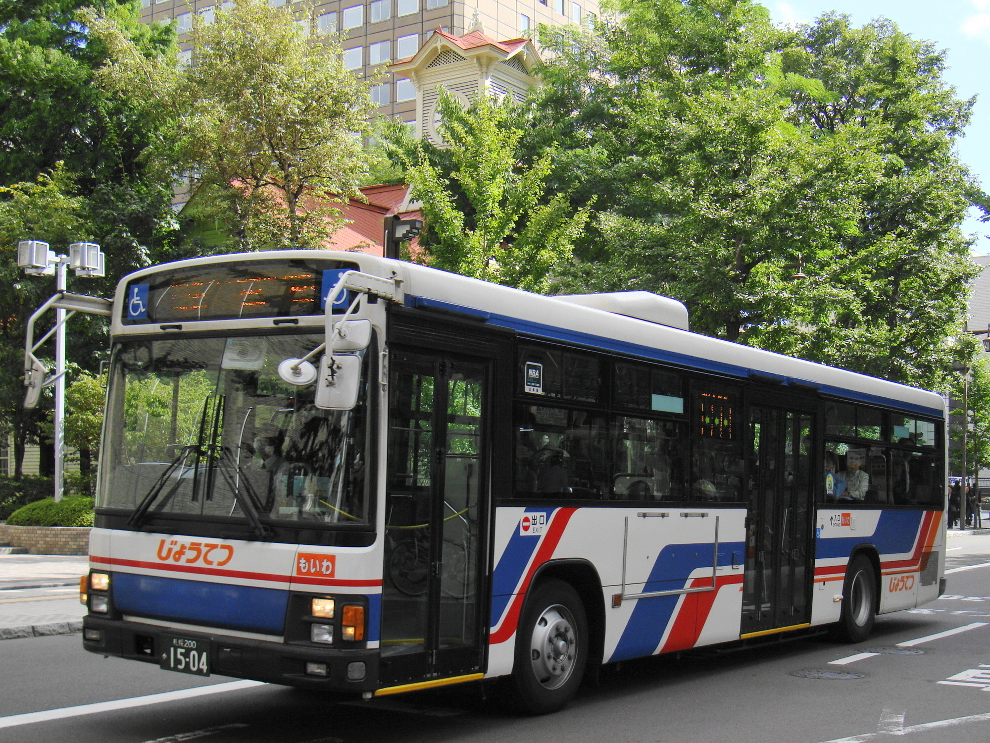 Sapporo city line